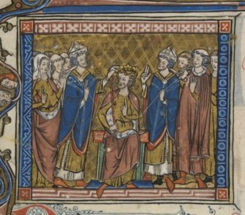 Baldwin III of Jerusalem